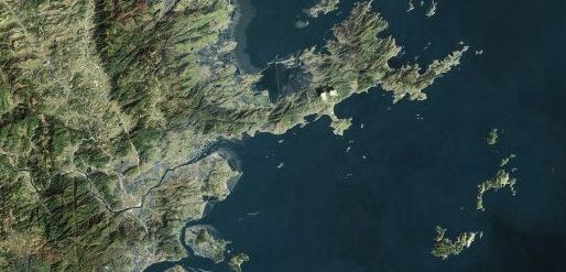 连江卫星图片Bân-lâm-gú: Liân-kang ê uē-tshenn-tôo